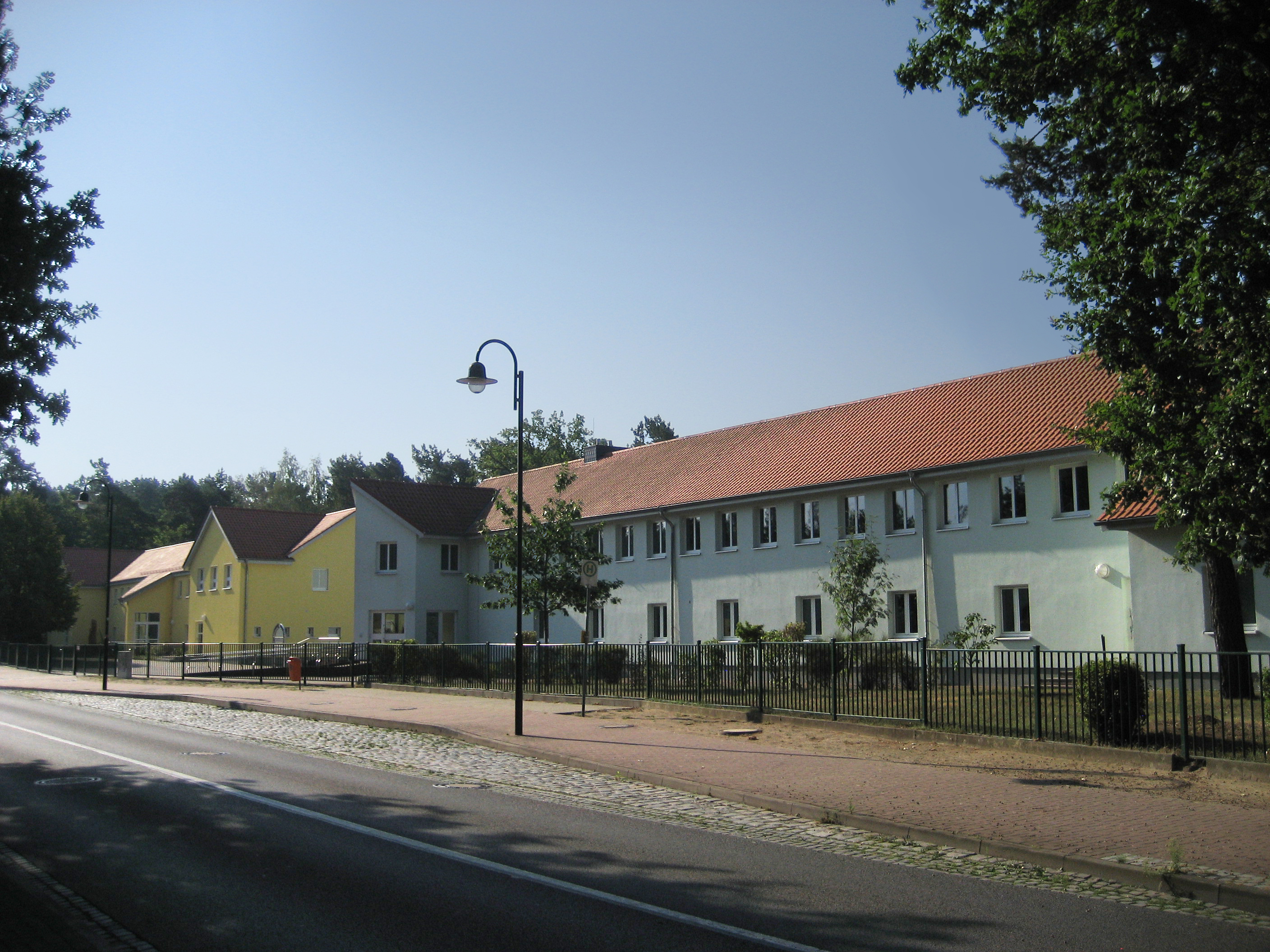 Die Europaschule Deutsch-Polnisches Gymnasium Löcknitz (EDPG Löcknitz).